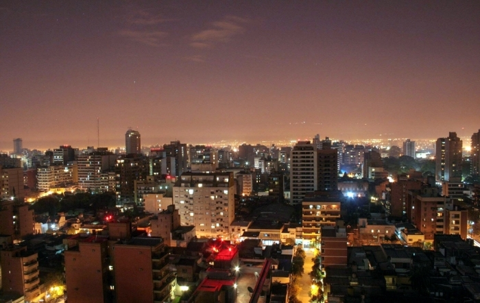 San Miguel de Tucumán nocturno.